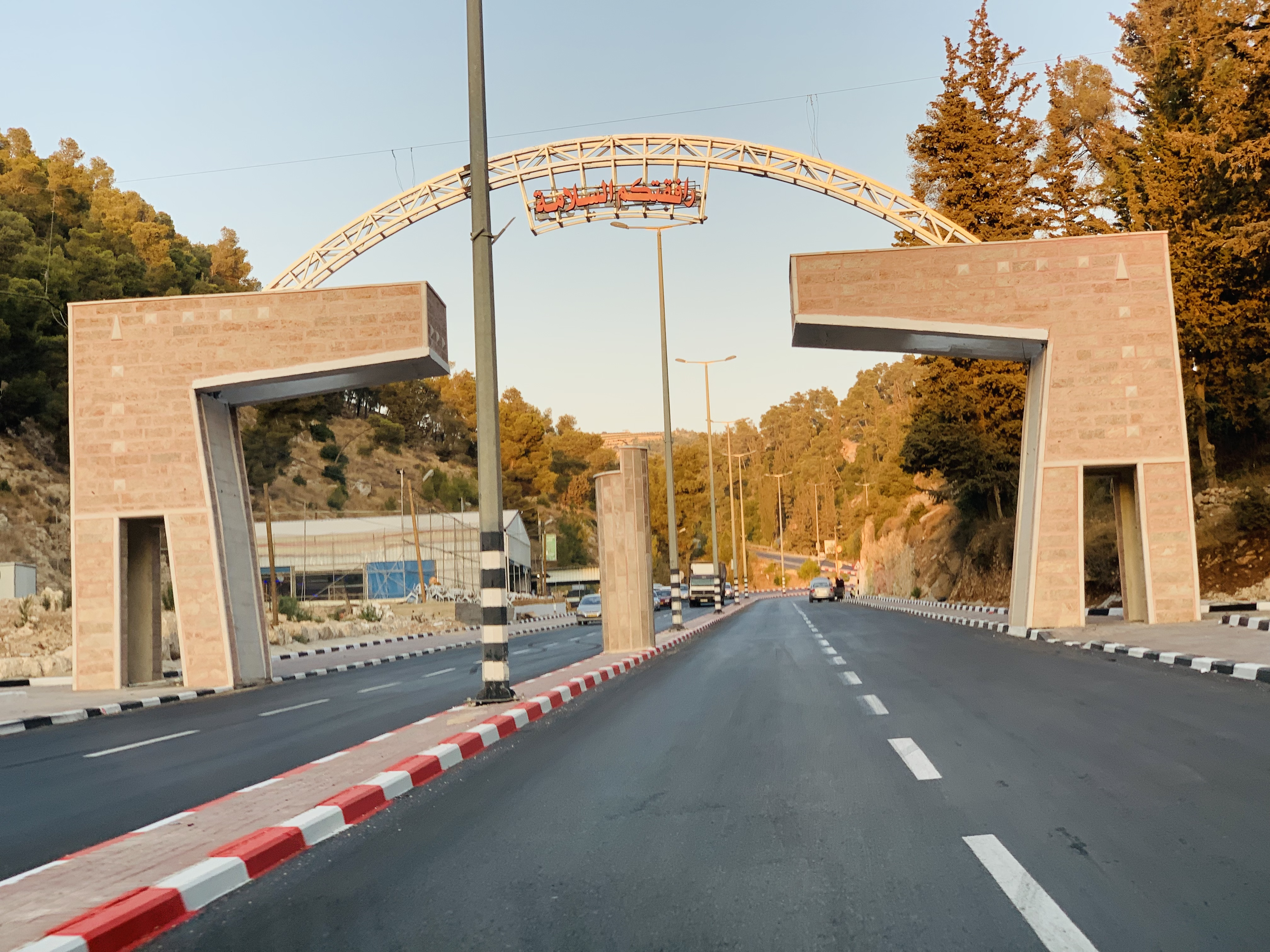 بوابة مدينة ترقوميا باتجاه مديني حلحول والخليل.